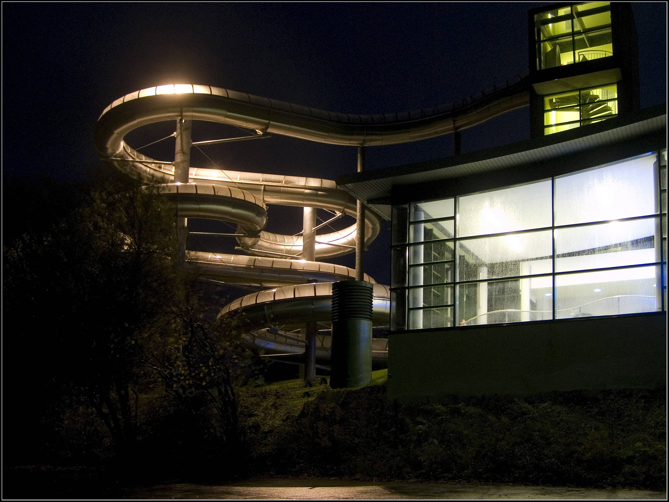 Großrutsche im Lagunenbad Willingen (Upland)/Hessen